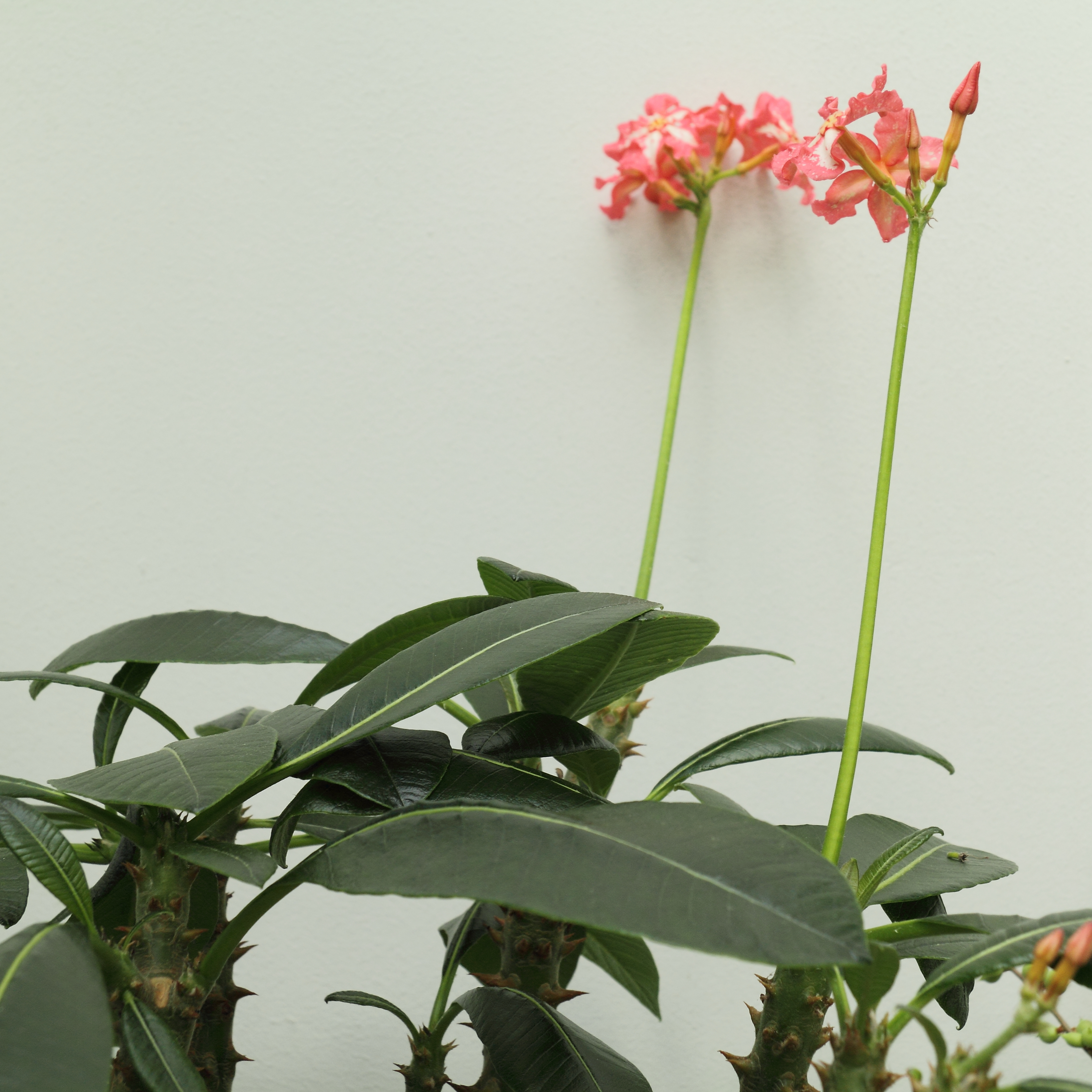 Pachypodium baronii, identifierad med hjälp av befintlig skylt vid Bergianska trädgården.